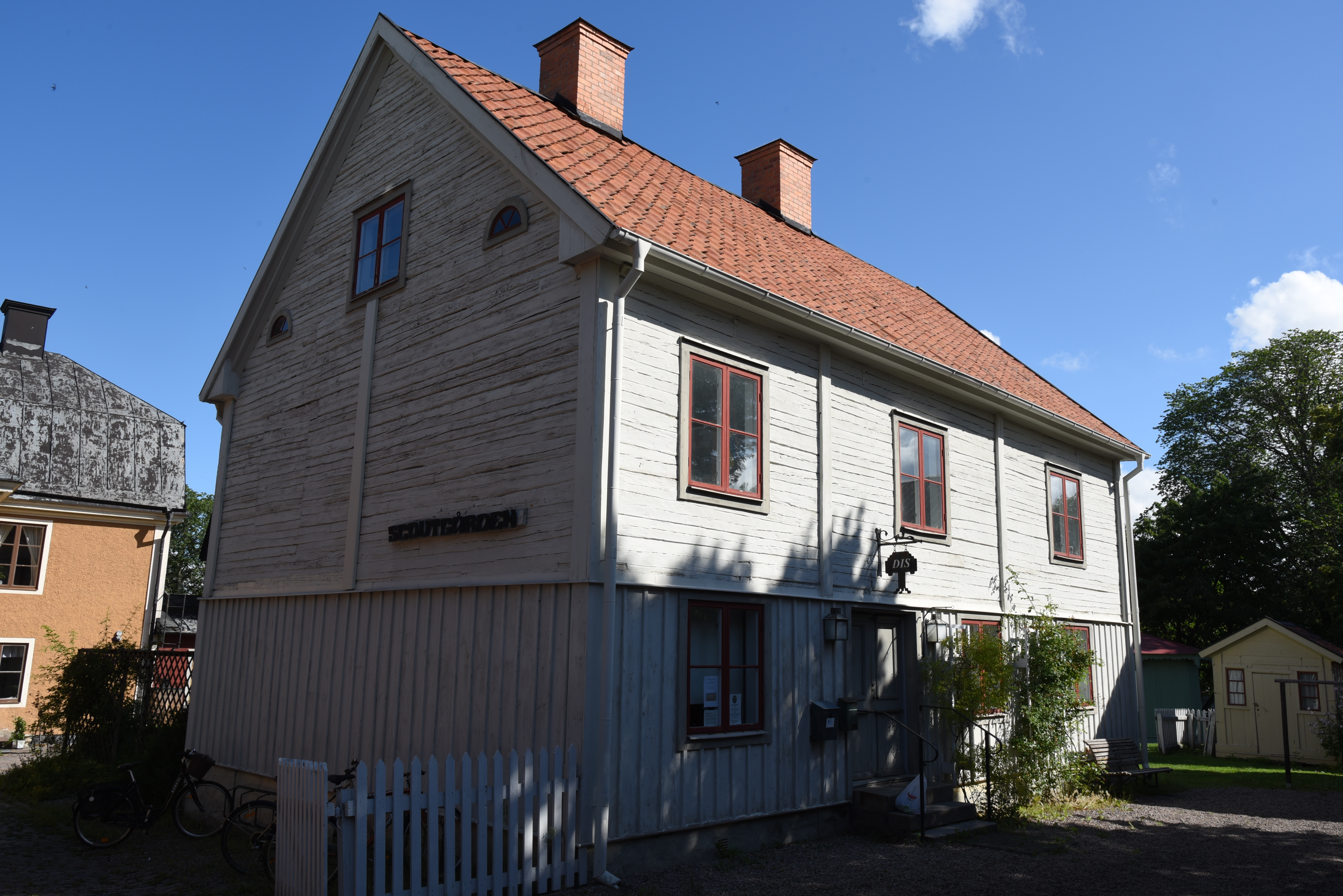 Gamla Linköping - Föreningen för datorhjälp i släktforskningen har sitt kansli i denna byggnad. Hovslagaregatan 3.